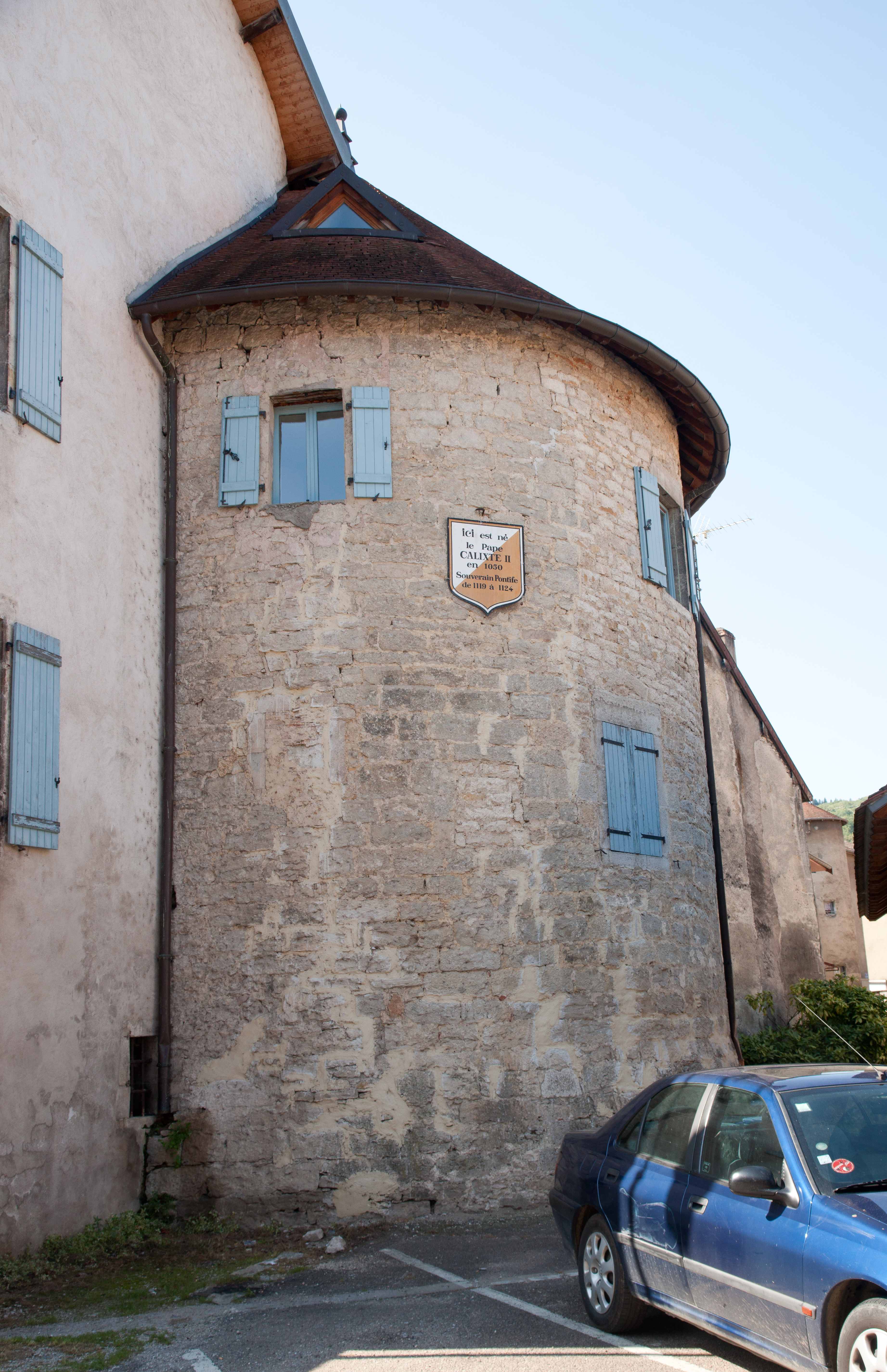 Château de Quingey .